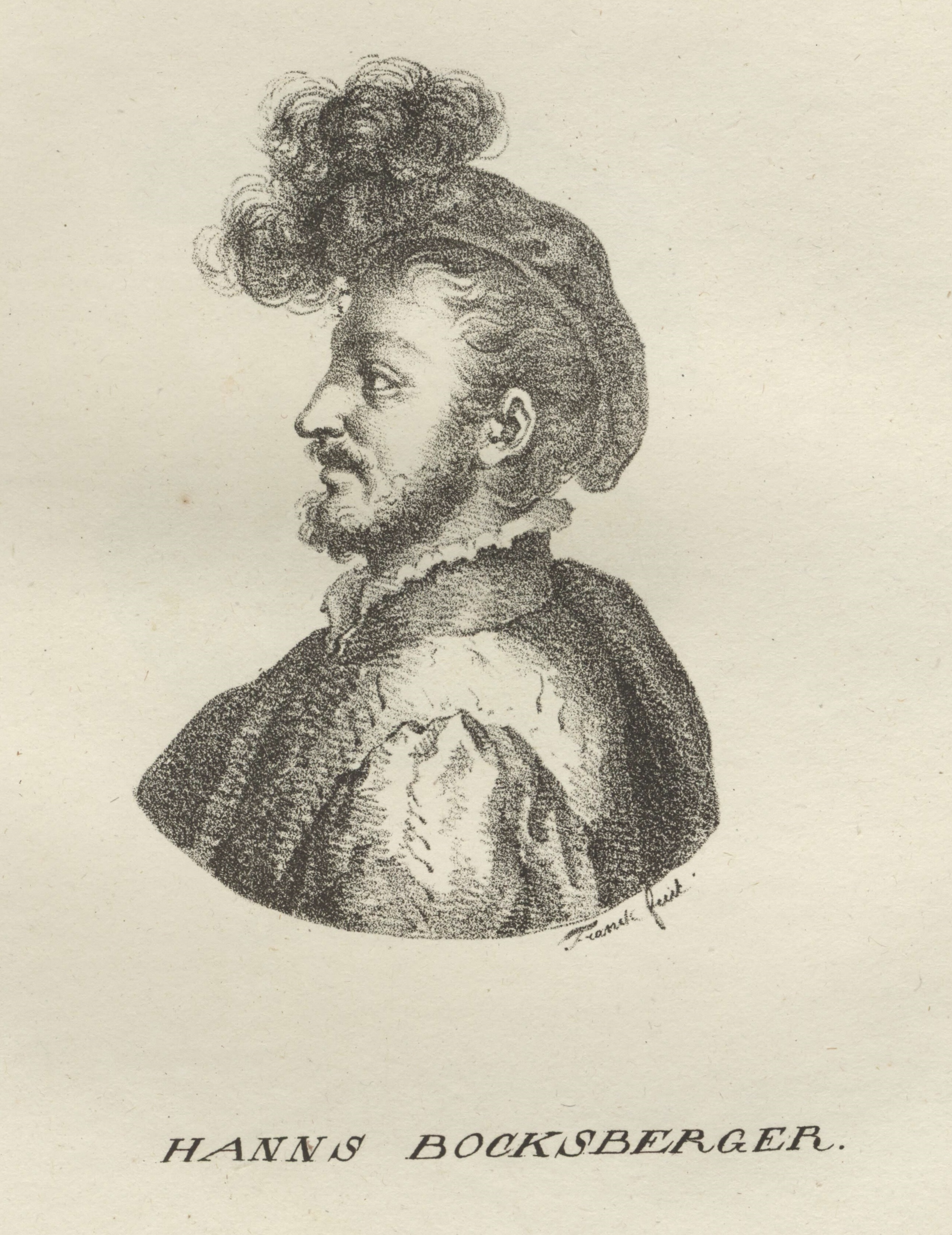 Porträt von Hans Bocksberger dem Älteren